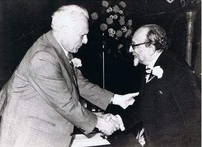 יוסף כהן צדק מקבל את אות יקיר ירושלים מנשיא המדינה אפרים קציר 1977